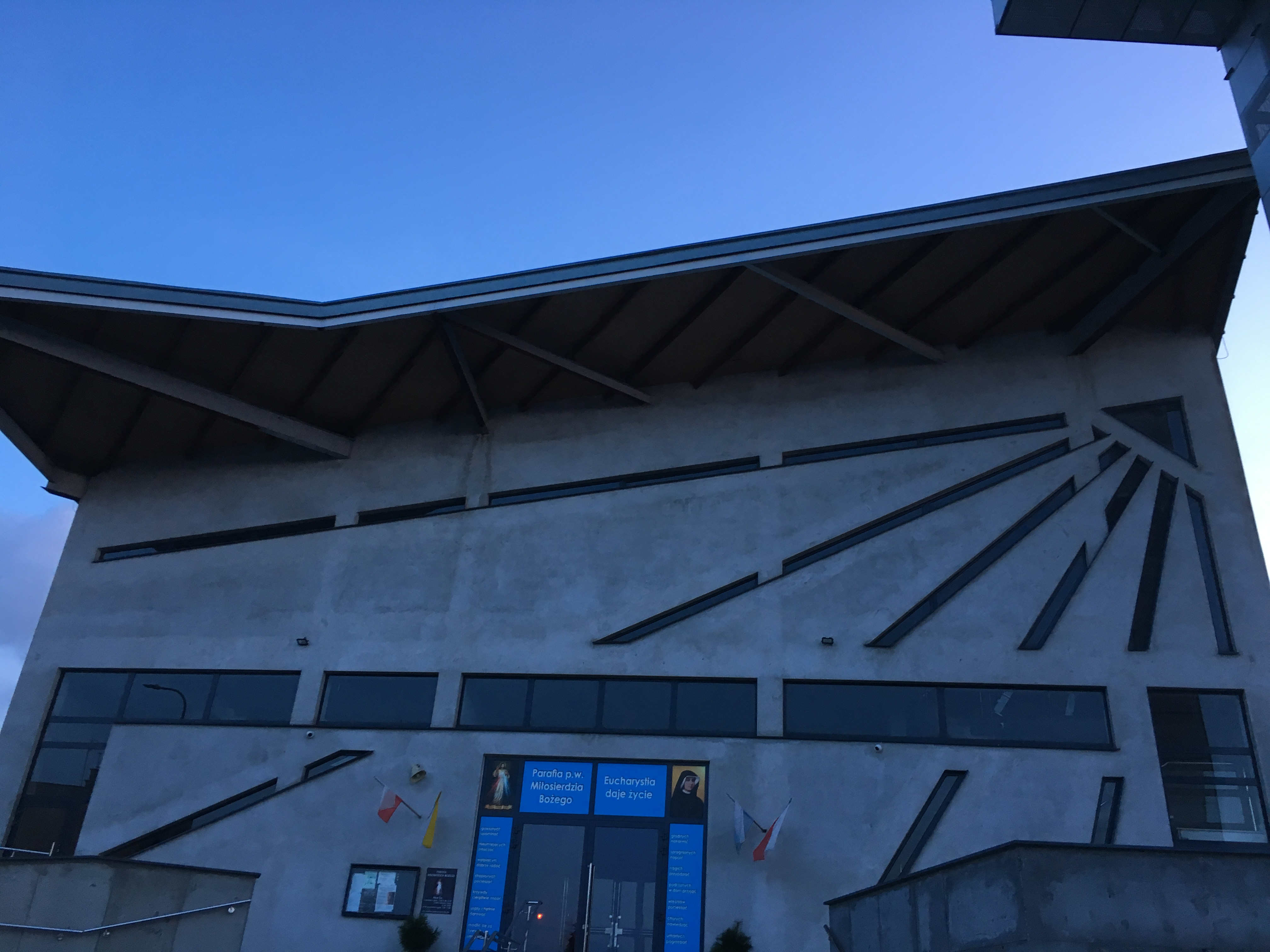 Kościół Miłosierdzia Bożego w Starogardzie Gdańskim. Fasada świątyni.